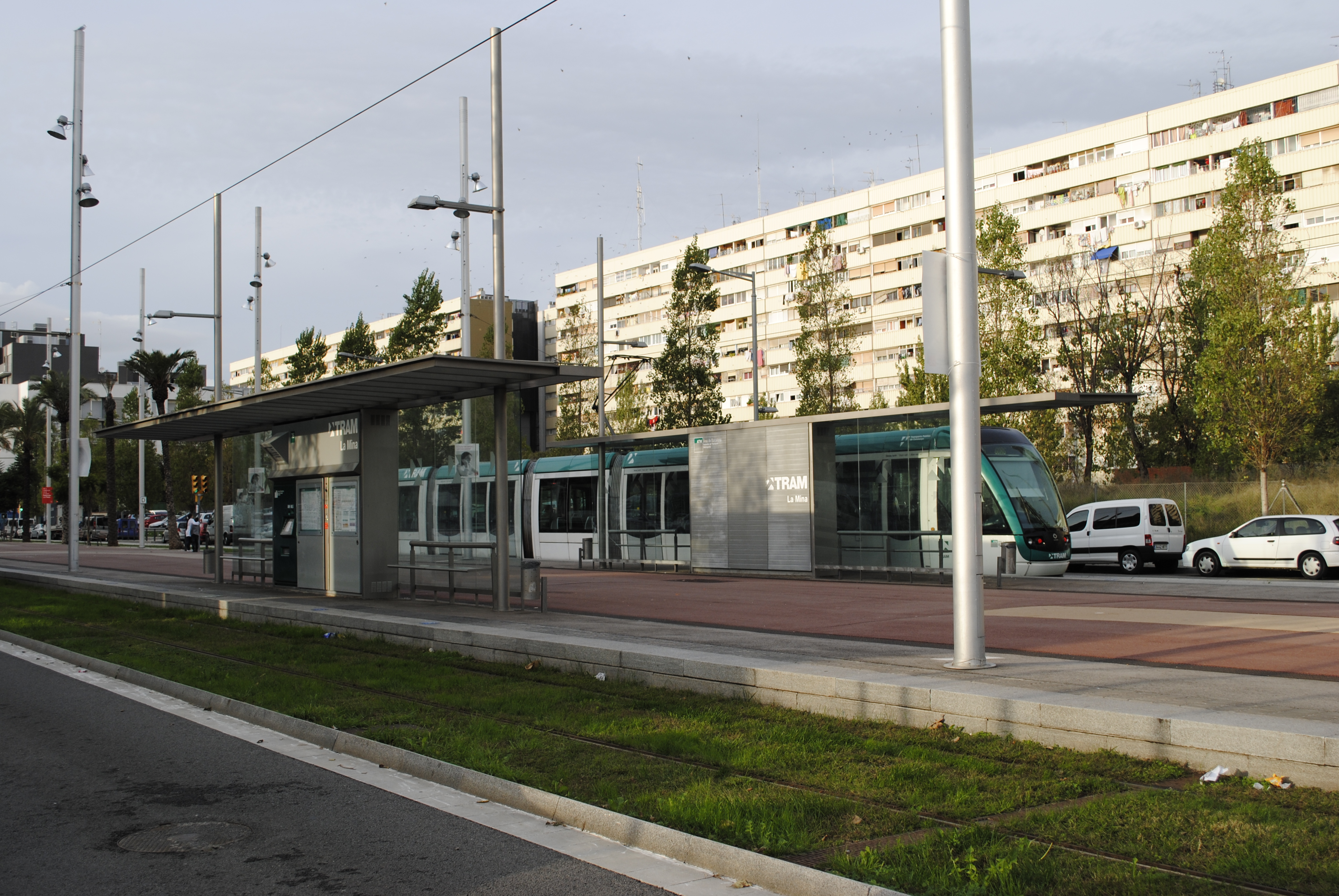 Estació de la Mina (Trambesòs)